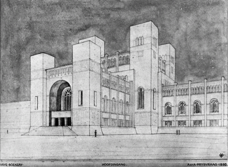 Algemeen Bibliotheekgebouw (ontwerp H.J.M. Walenkamp, niet uitgevoerd)